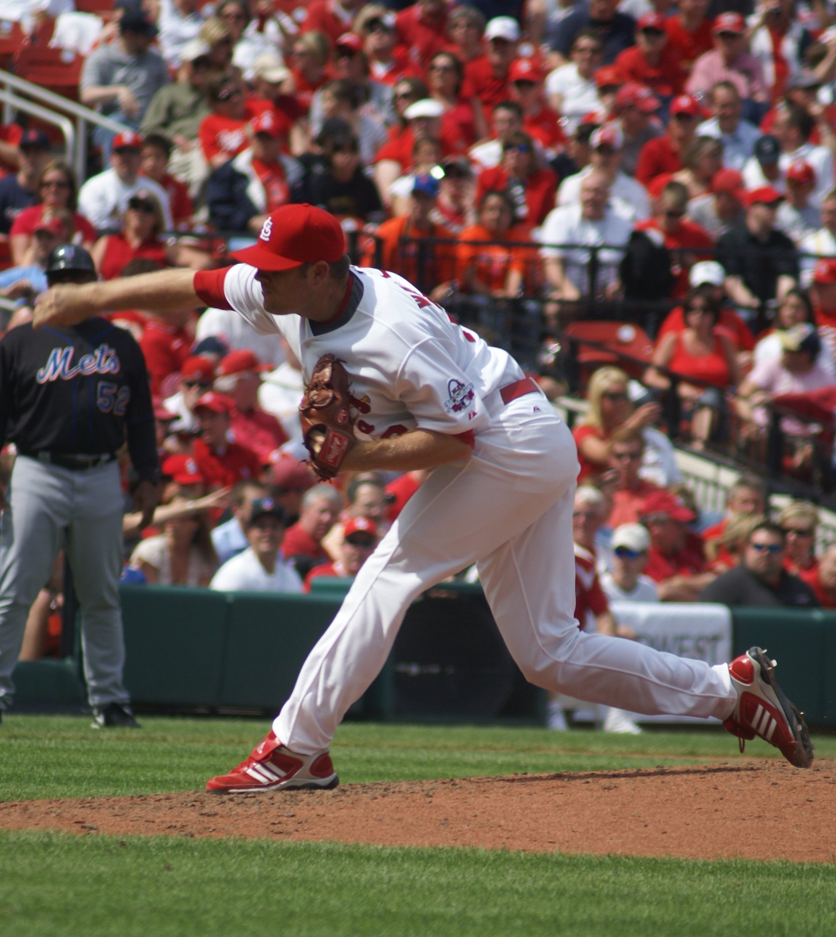 P. J. Walters